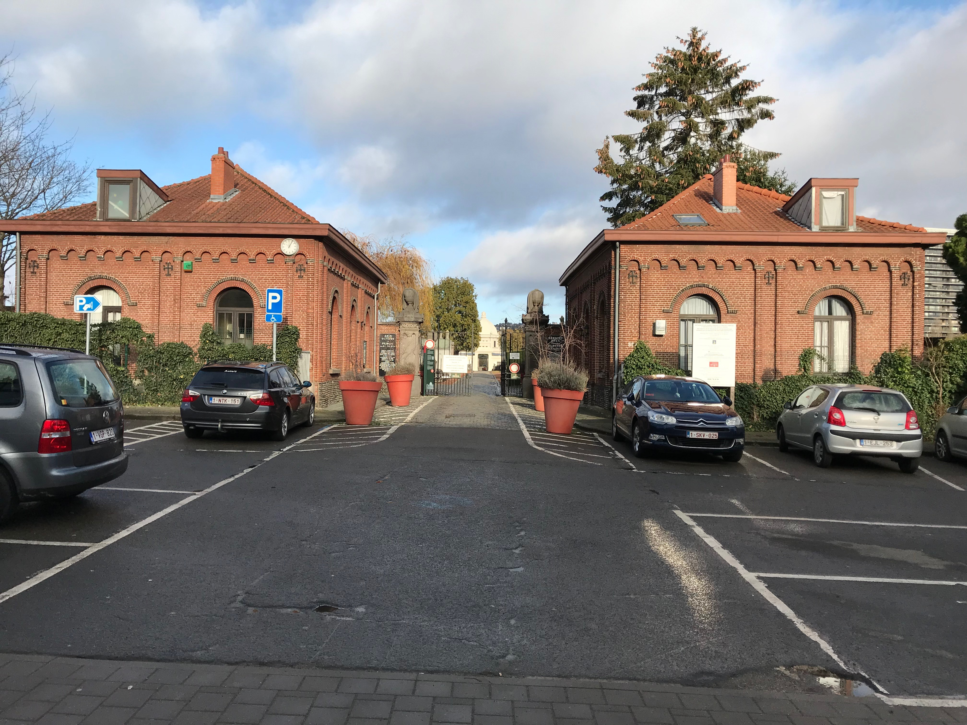 Cimetière de Molenbeek à Bruxelles